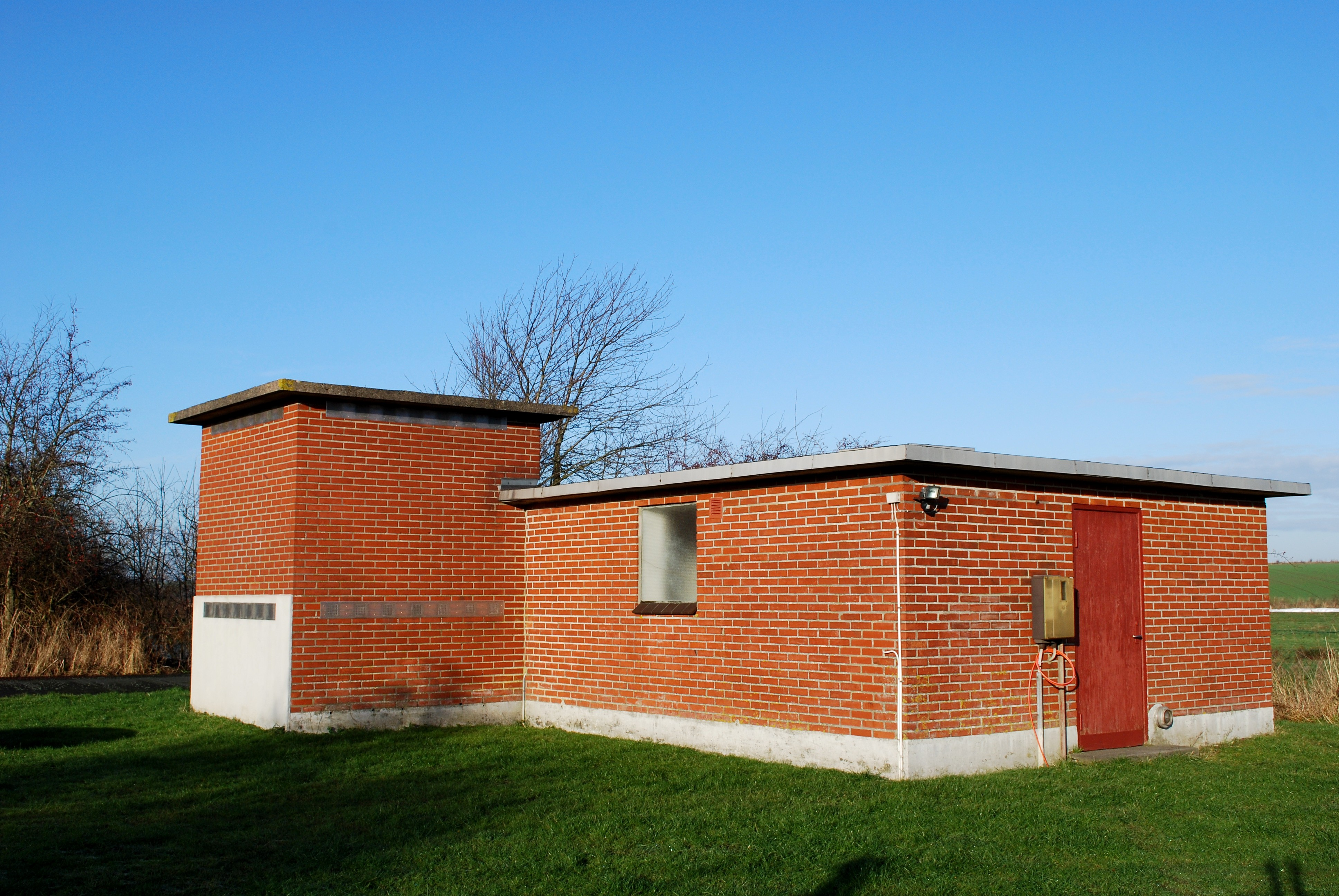 Øster Sottrup vandværk